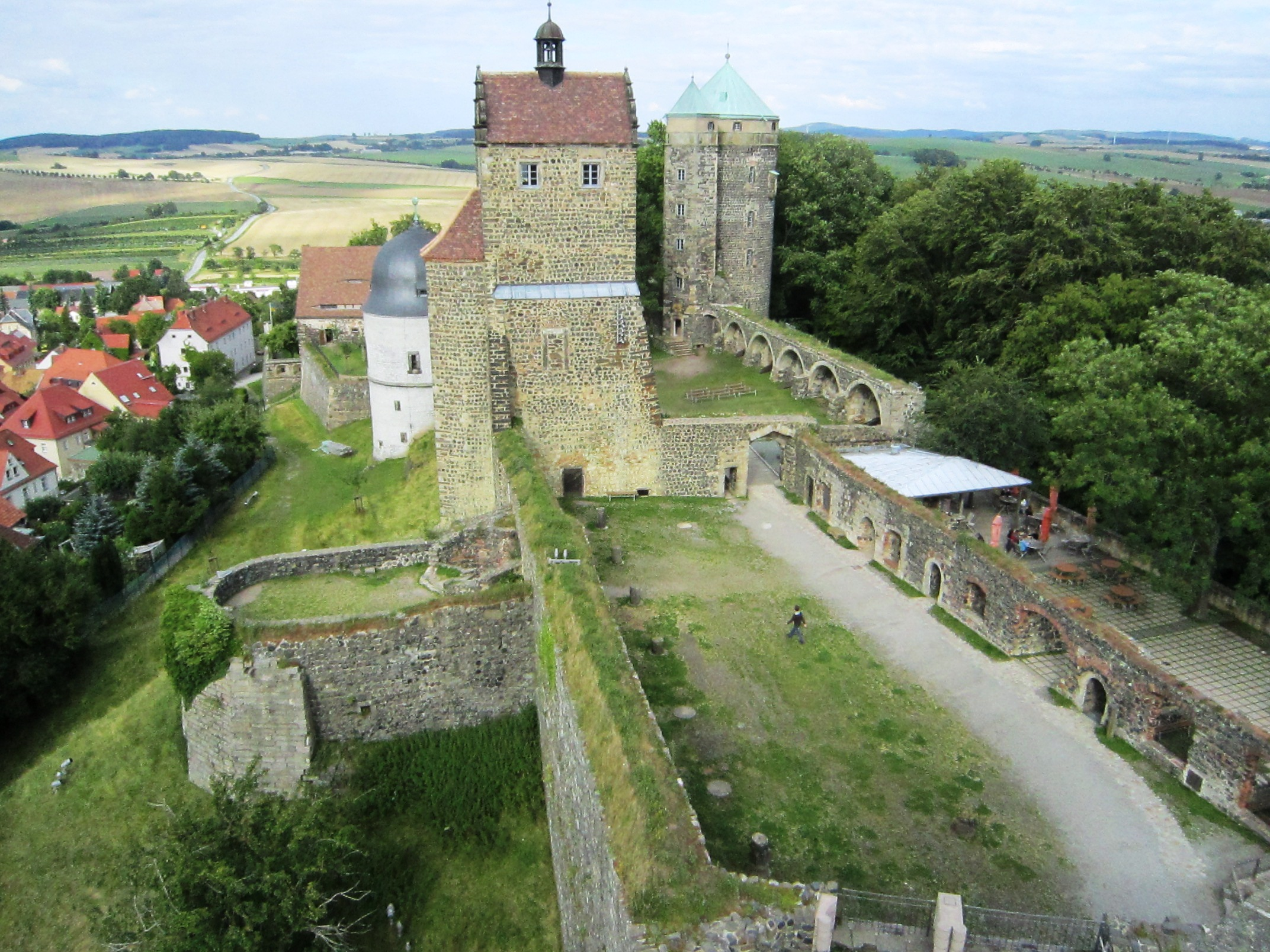 Slot Stolpen (Saksen) Duitsland